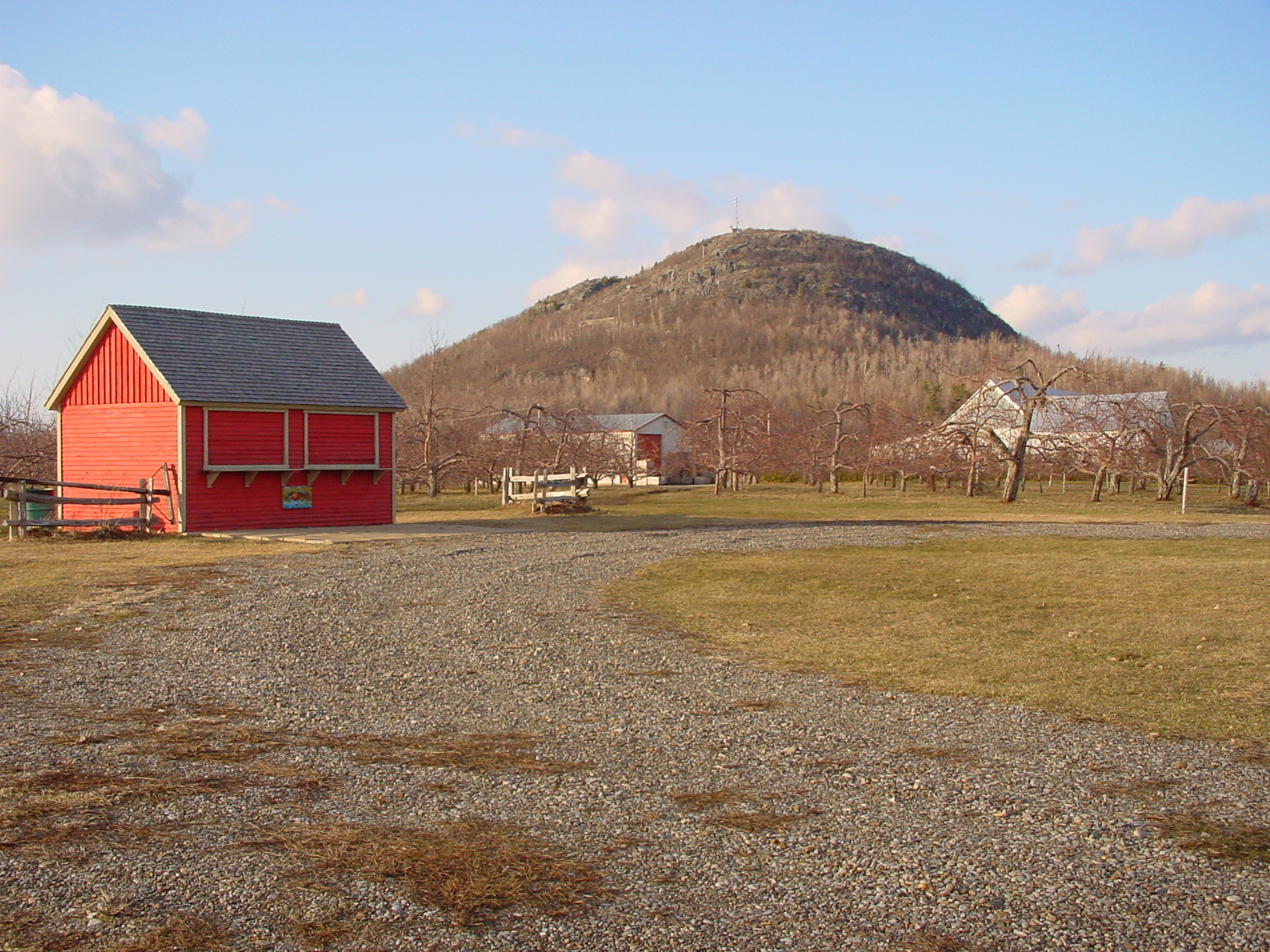 Mont-Saint-Grégoire, Montérégie, Québec, Canada Image:Mont-Saint-Grégoire